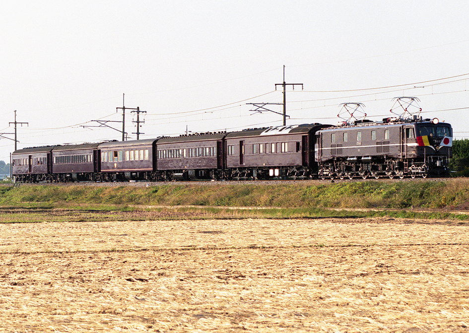 EF58 61けん引お召し列車